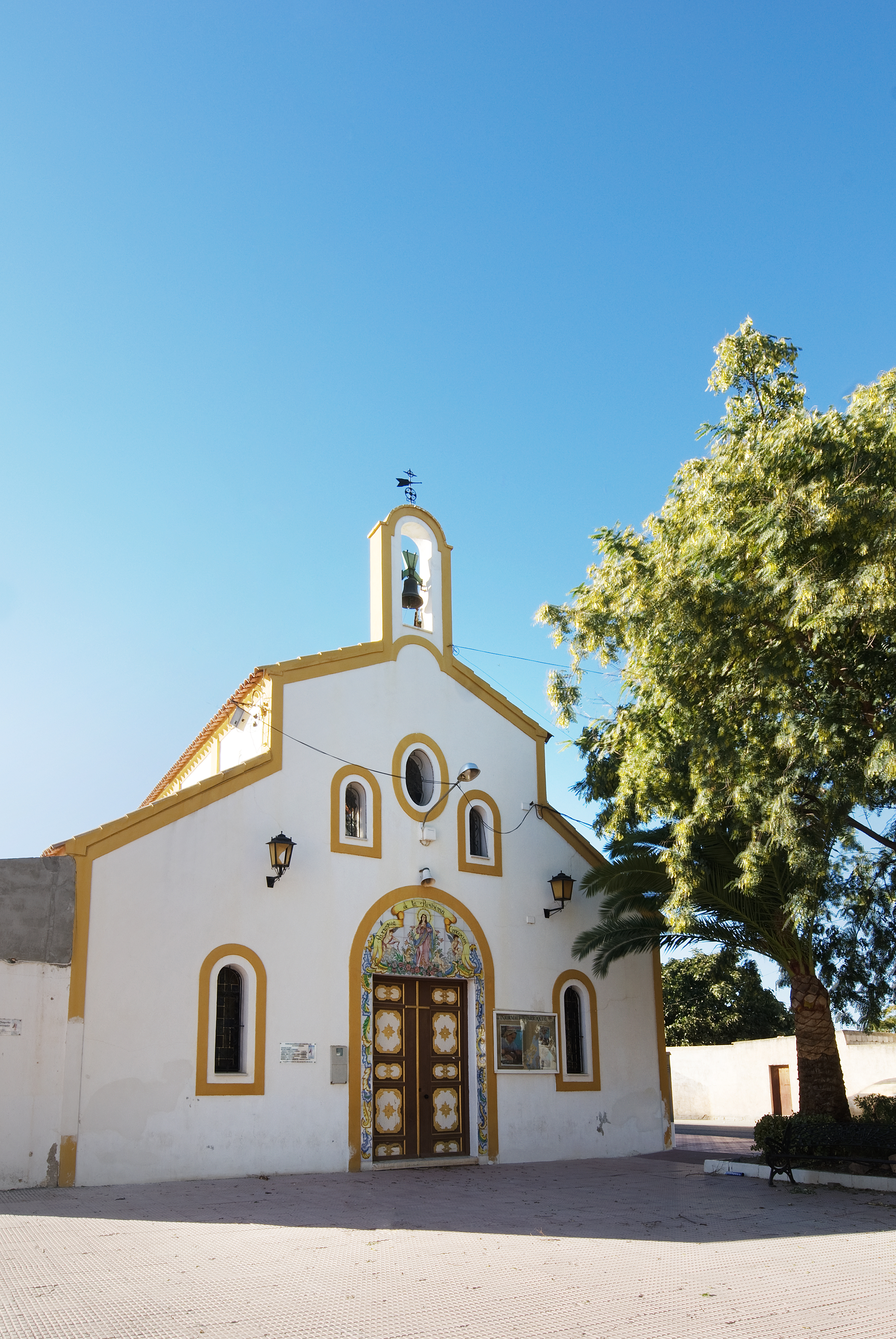 Vista de la fachada de la ermita de la Purísima Concepción situada en la pedanía de El Esparragal (Puerto Lumbreras)